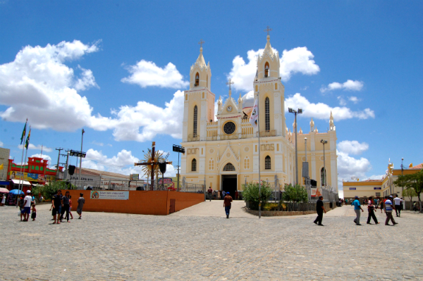 Basílica de São Francisco